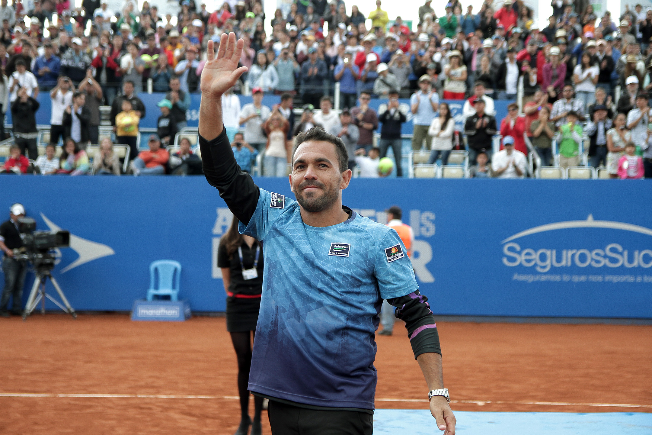 Quito, 08 feb (ANDES).- Final ATP 250 Ecuador Open Quito donde compitieron por el campeonato los tenistas Victor Estrella y Feliciano López. Fotografías: Carlos Rodríguez/ANDES.